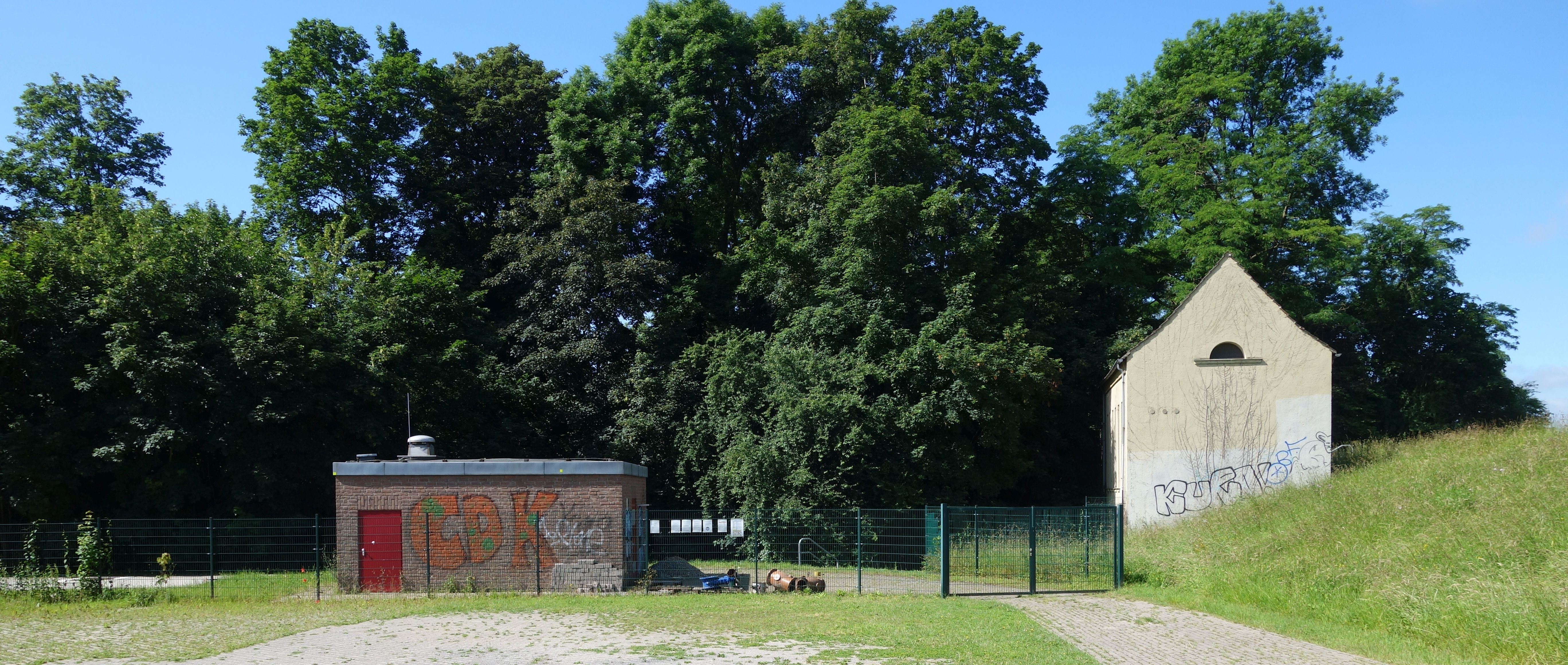 Pumpstation Herbert-Eulenberg-Weg 8 (Düsseldorf), 2019. Pumpstation Herbert-Eulenberg-Weg 8 (Düsseldorf), 2019 (05).jpg Pumpstation Herbert-Eulenberg-Weg 8 (Düsseldorf), 2019 (06).jpg